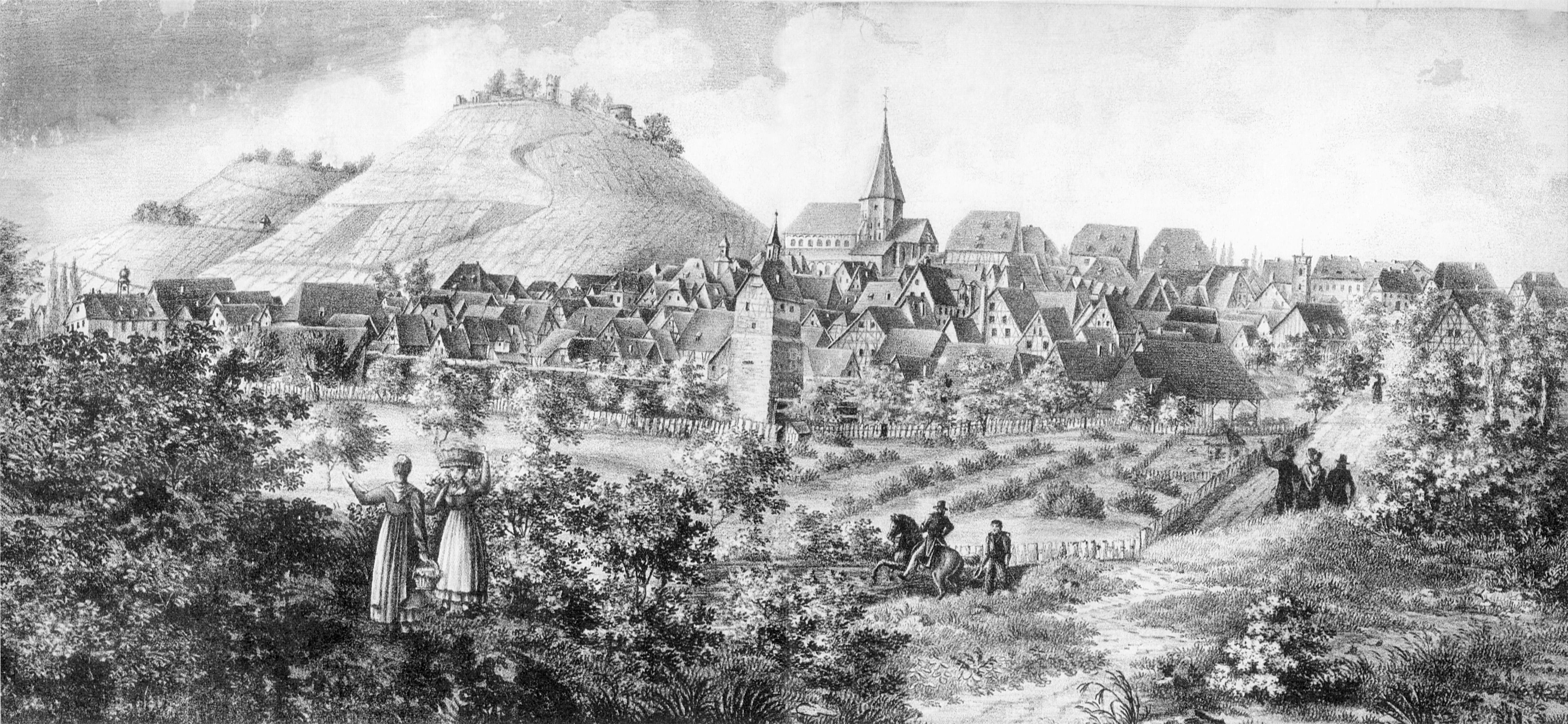 Weinsberg ca. 1803/1809. Scanned by Rosenzweig, improved by Rainer Zenz